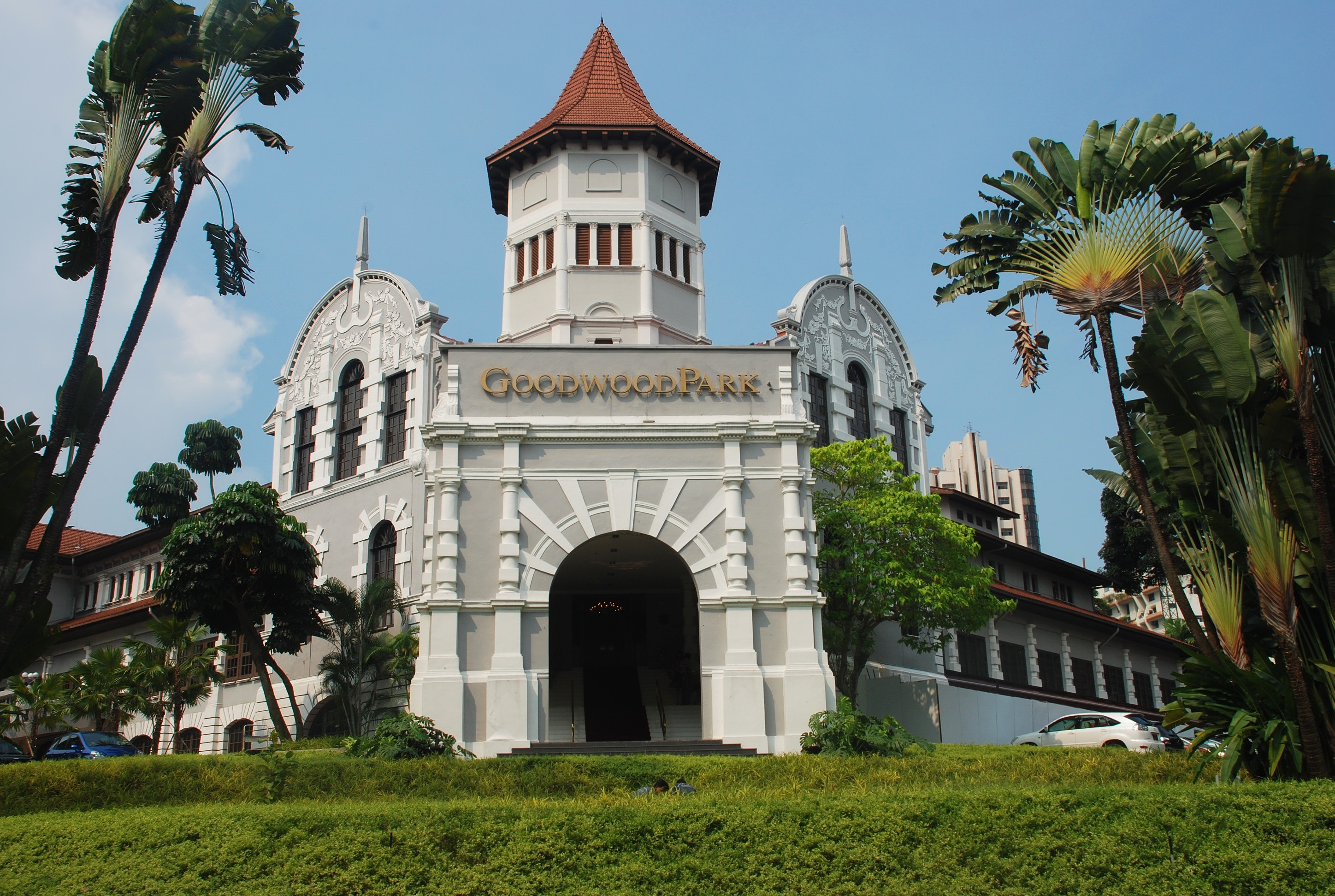 Goodwood Park Hotel, Singapore.